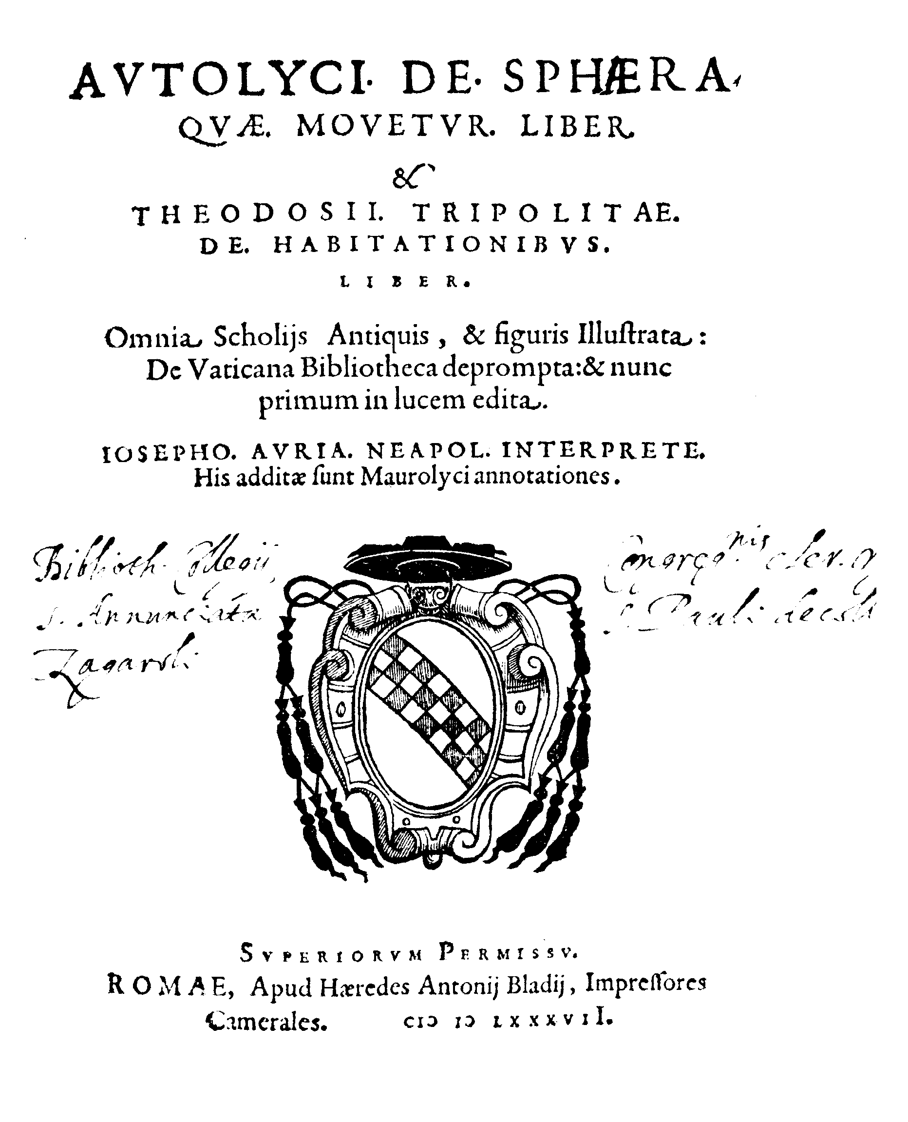 Autolyci De sphera. quae. mouetur. liber. & Theodosij. Tripolitae. De habitationibus. liber. Omnia scholijs antiquis, & figuris illustrata: de vaticana bibliotheca deprompta: & nunc primum in lucem edita. Iosepho. Auria. Neapol. interprete. His additae sunt Maurolyci annotationes. - Romae : apud haeredes Antonij Bladij, impressores camerales, 1587. - [4], 70 p. : ill. ; 4º .